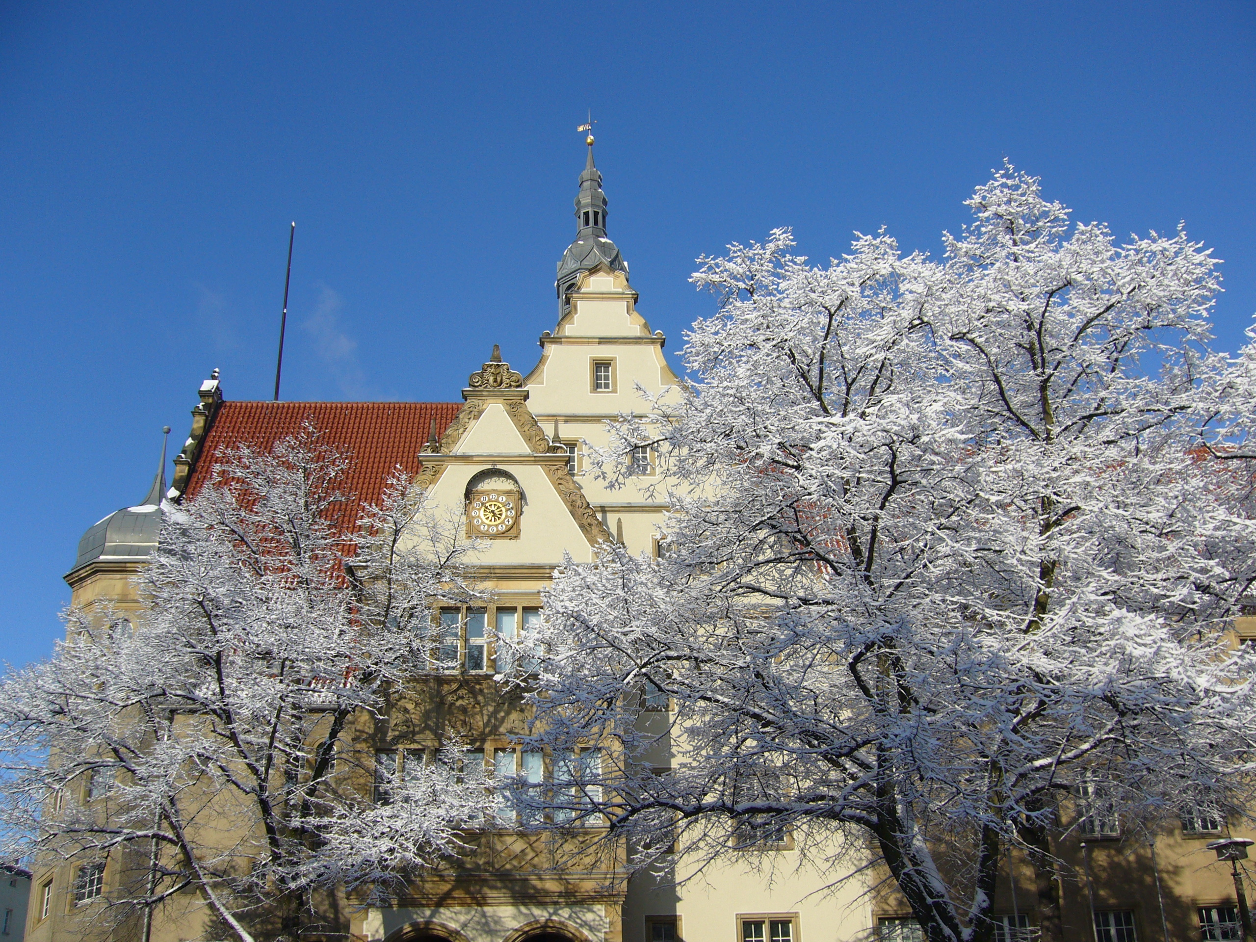 Das Dienstgebäude Parkstraße des Amtsgerichts Pankow/Weißensee im Winter